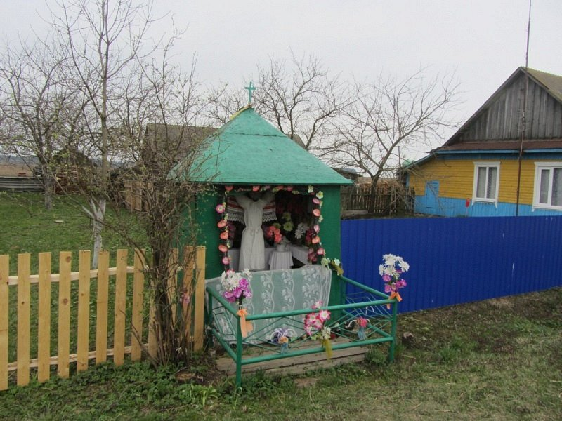 Узнога. Капліца з распяццем